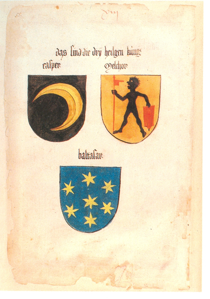 Ingeram-Codex der ehemaligen Bibliothek Cotta Xiii das sind die dry heilgen küng casper melchor baltasar